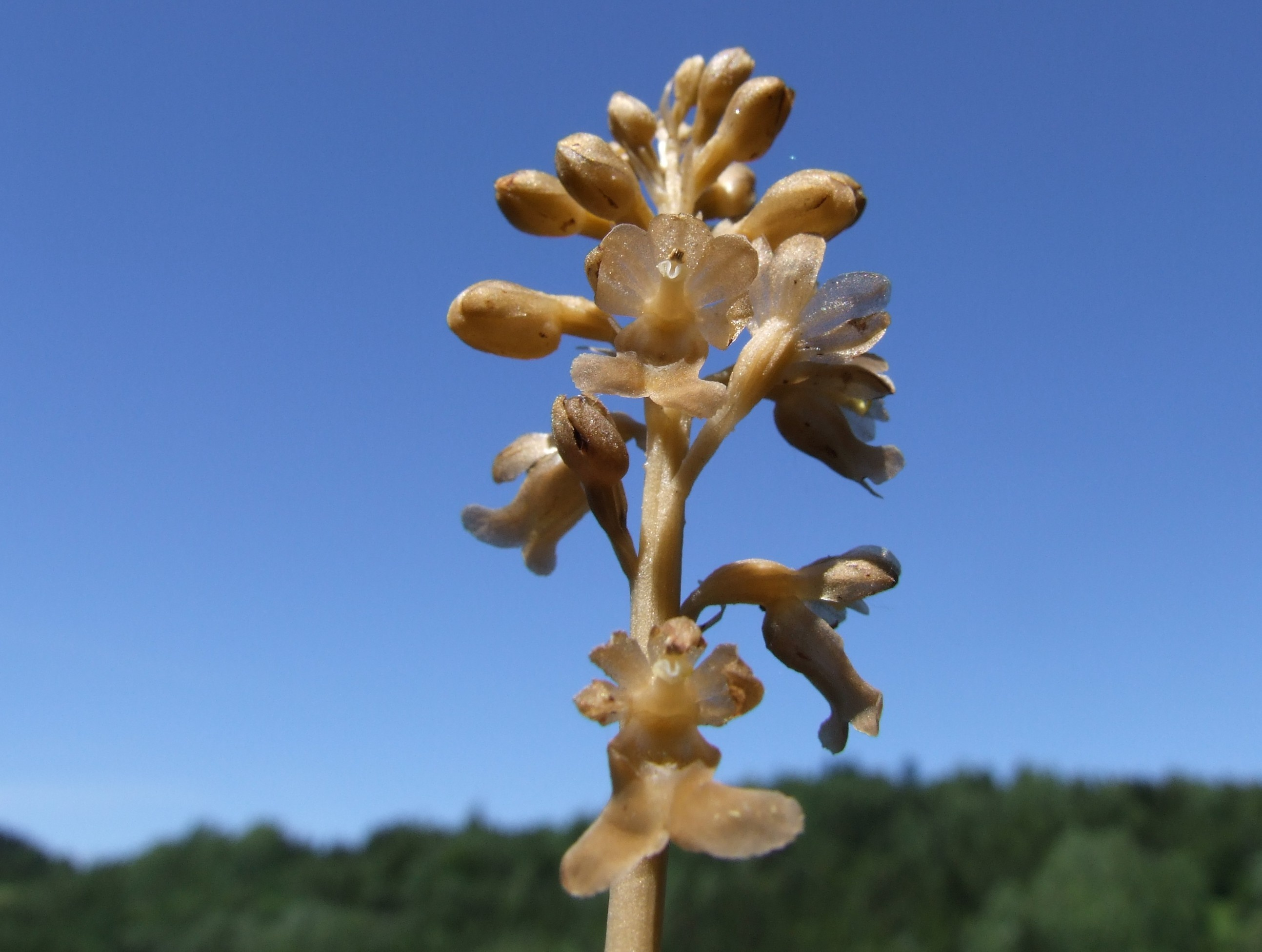 Neottia nidus-avis (habitat:Pieniny)